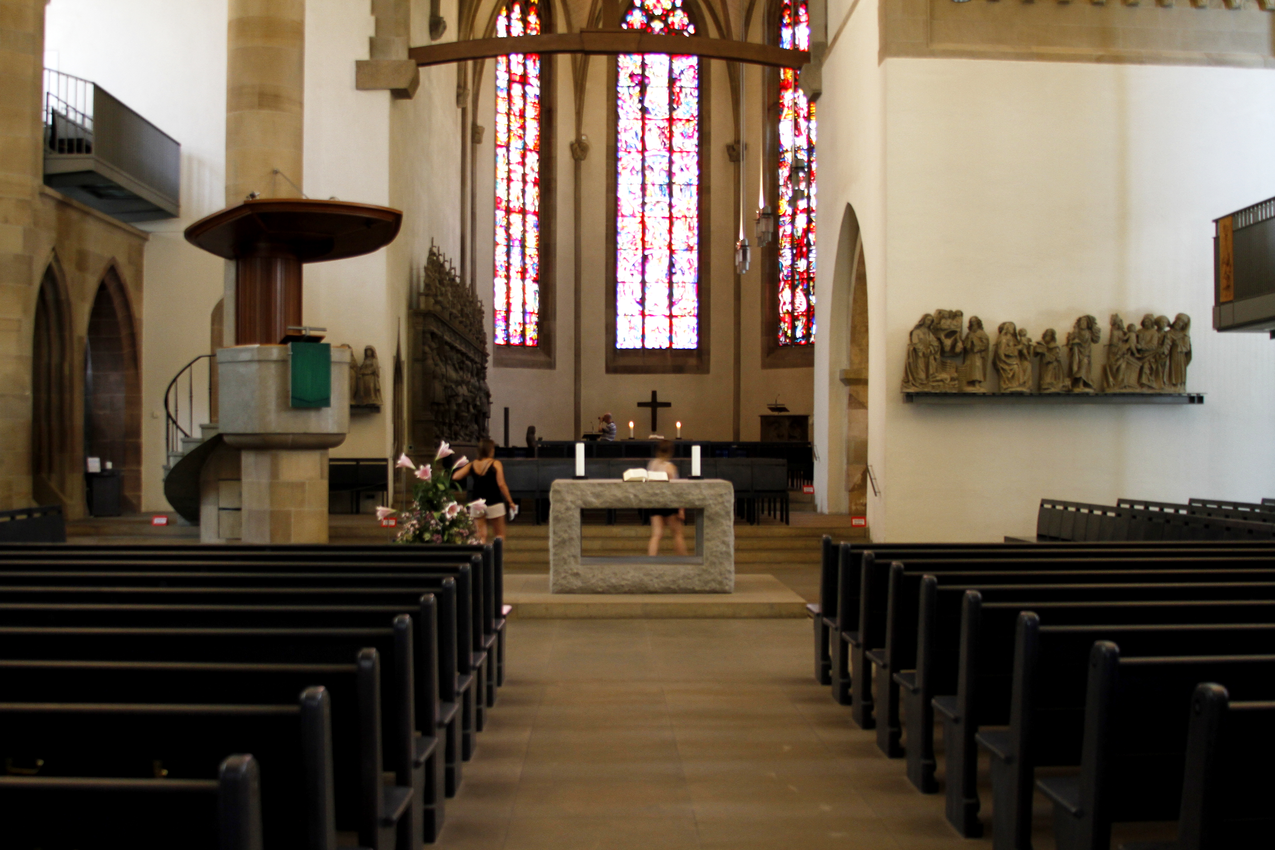 Stiftskirche - Stuttgart - Germany